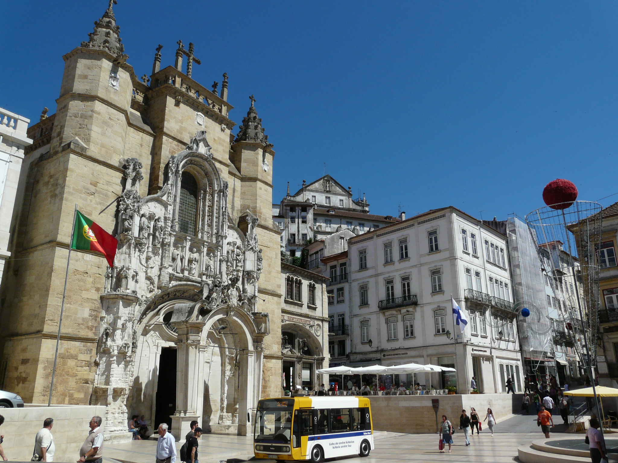 Praca 8 de Maio & Igreja de Santa Cruz in Coimbra